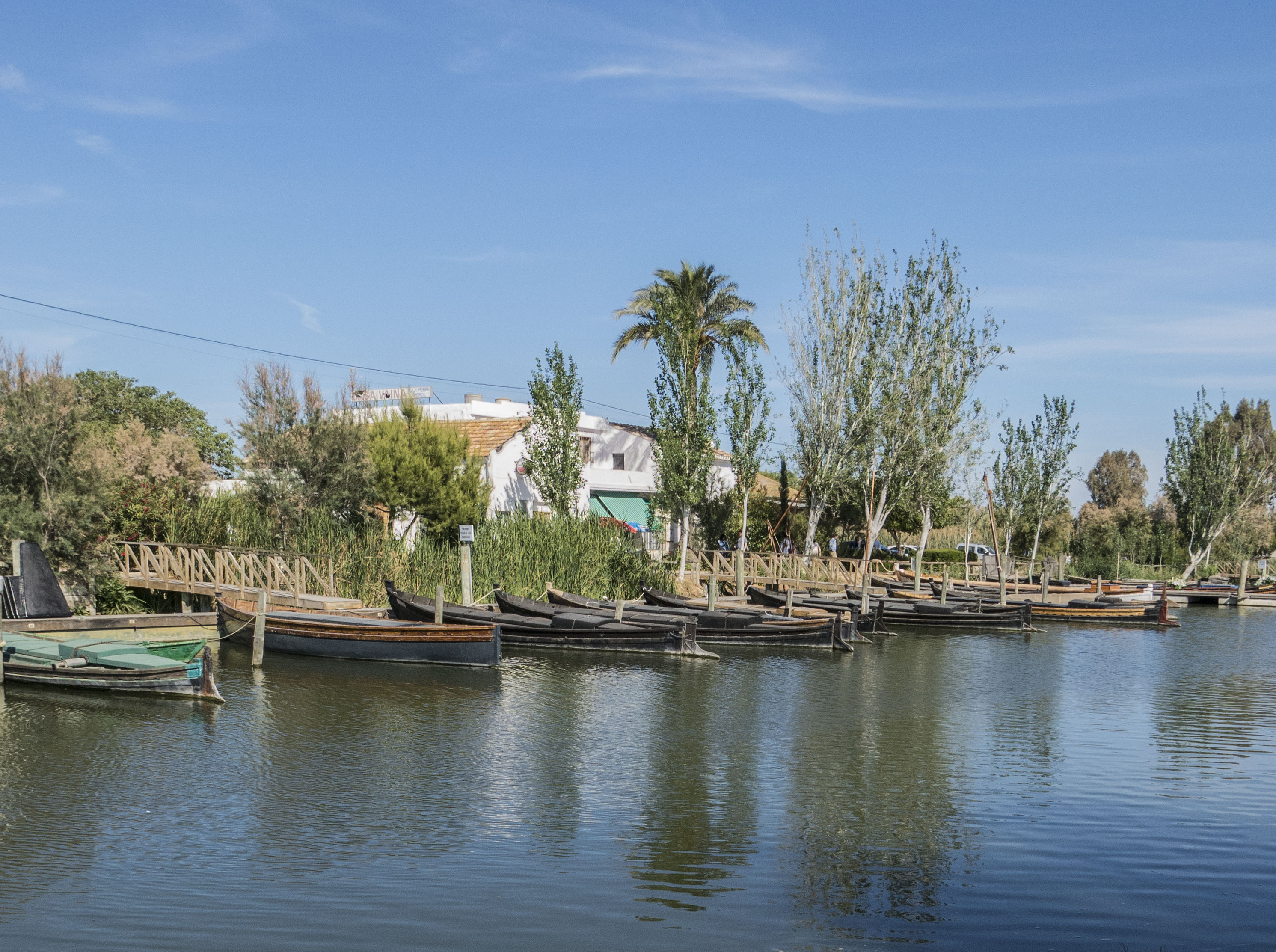 Catarroja és un municipi del País Valencià situat a la comarca de l'Horta Sud. El port és un dels punts d'entrada al Parc Natural de l'Albufera de València.